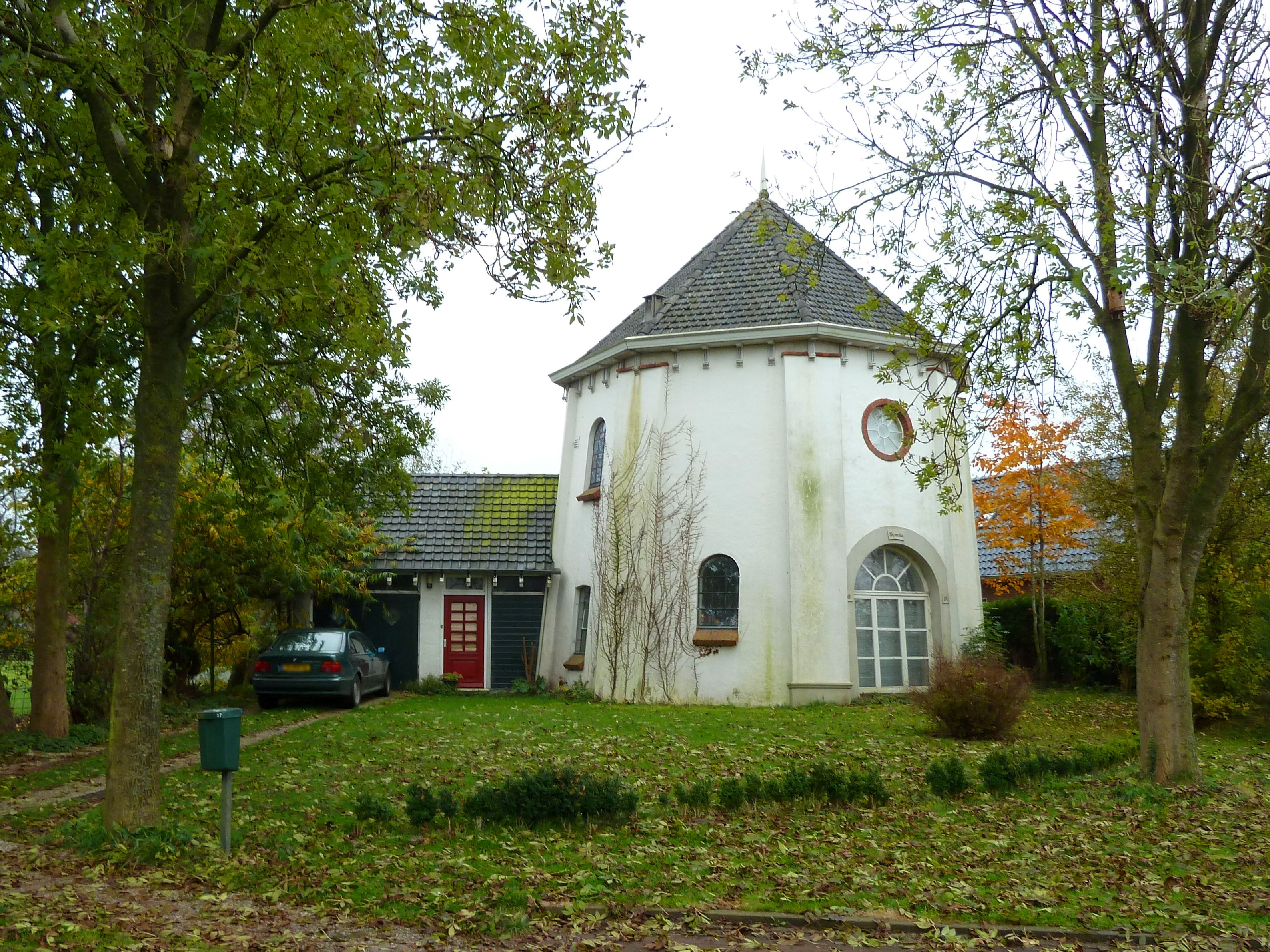 De tot woning verbouwde molenromp van korenmolen 'De Noordstar' in Niekerk. Gebouwd in 1846 als pelmolen. Verbouwd tot korenmolen in 1865. Onttakeld in 1874. In 1910 en 1976 tweemaal verbrand. In 1988 verbouwd tot woning.